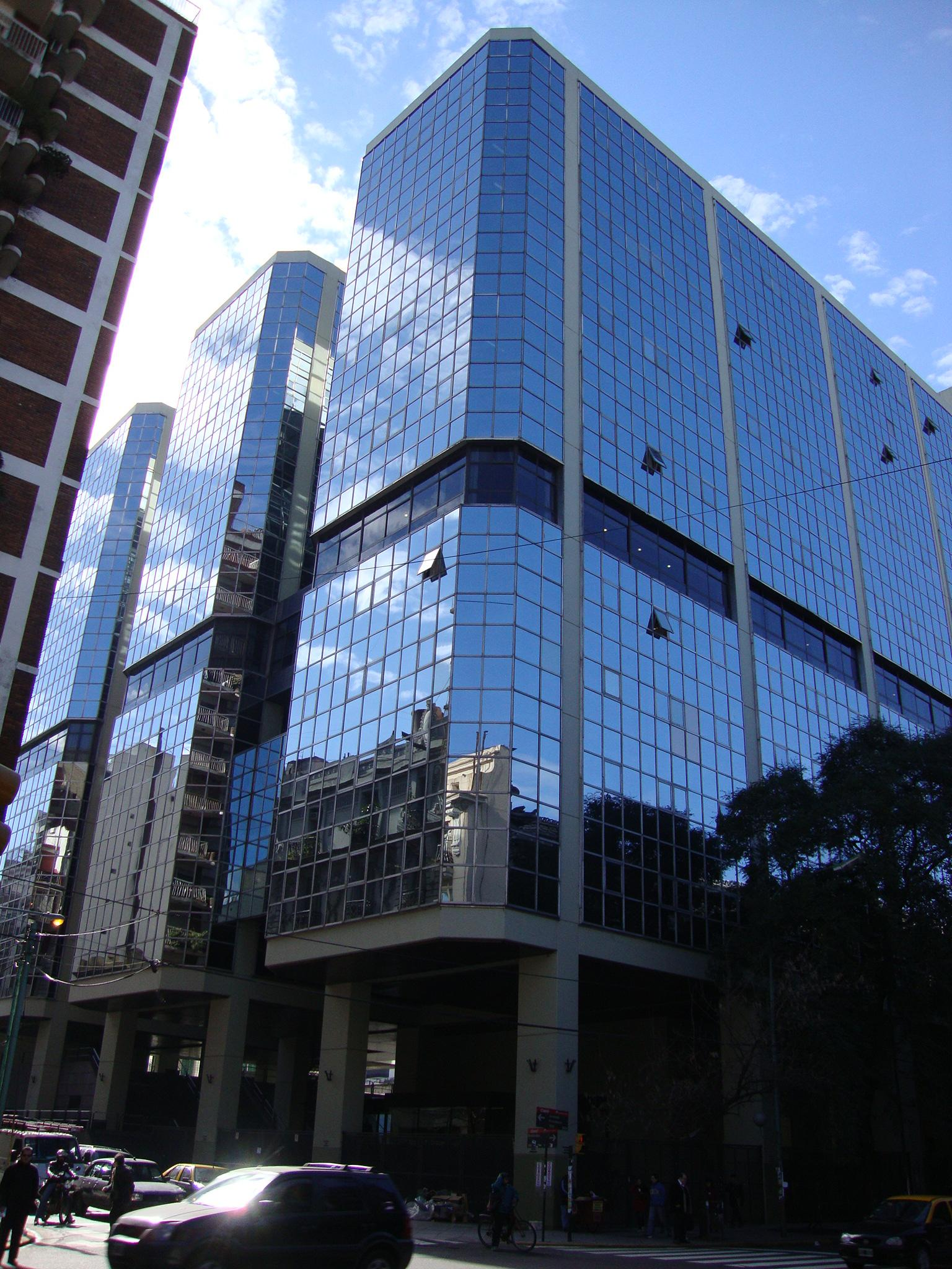 Vista desde la esquina de Av. Rivadavia y Combate de los Pozos del edificio Anexo de la Cámara de Diputados de la Nación Argentina. El edificio fue proyectado por los arquitectos Manteola, Petchersky, Sánchez Gómez, Santos, Solsona y Viñoly; quienes ganaron el concurso realizado en 1967. La construcción comenzó en 1973, pero finalizó recién en 1985, ya que desde 1976 a 1983 la Argentina fue gobernada por una dictadura militar. Buenos Aires, Argentina